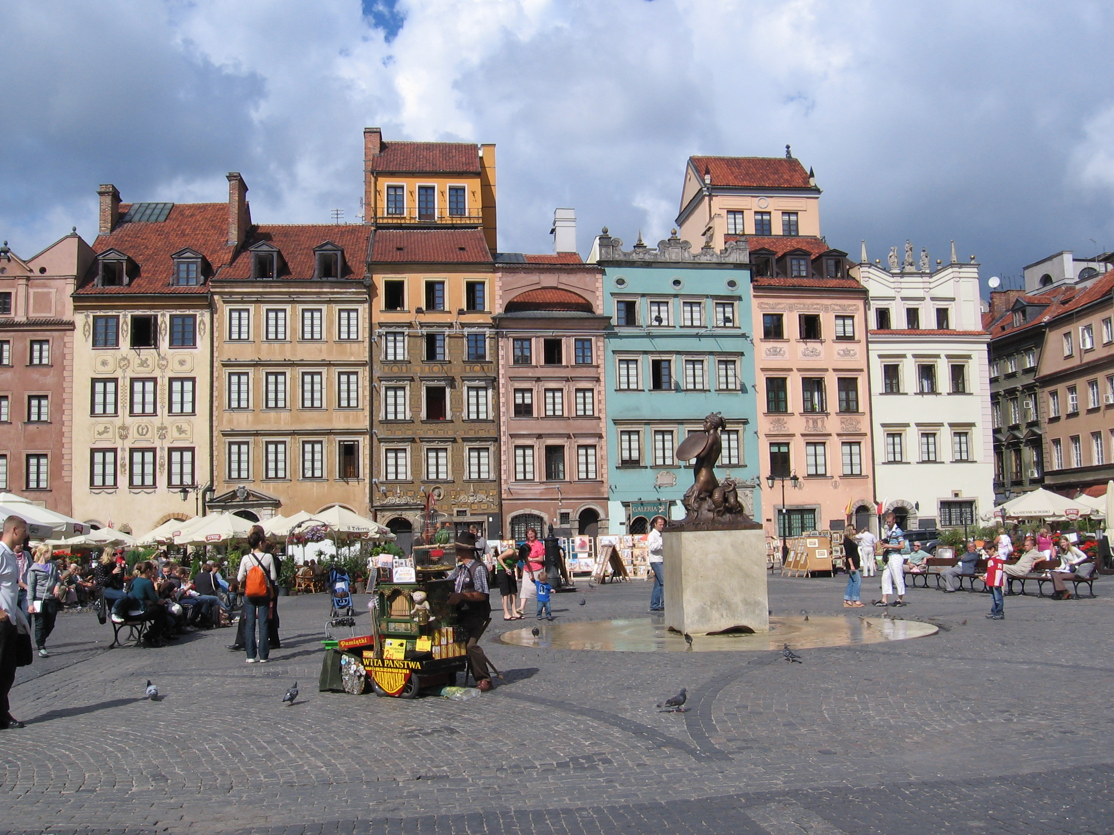 Фото